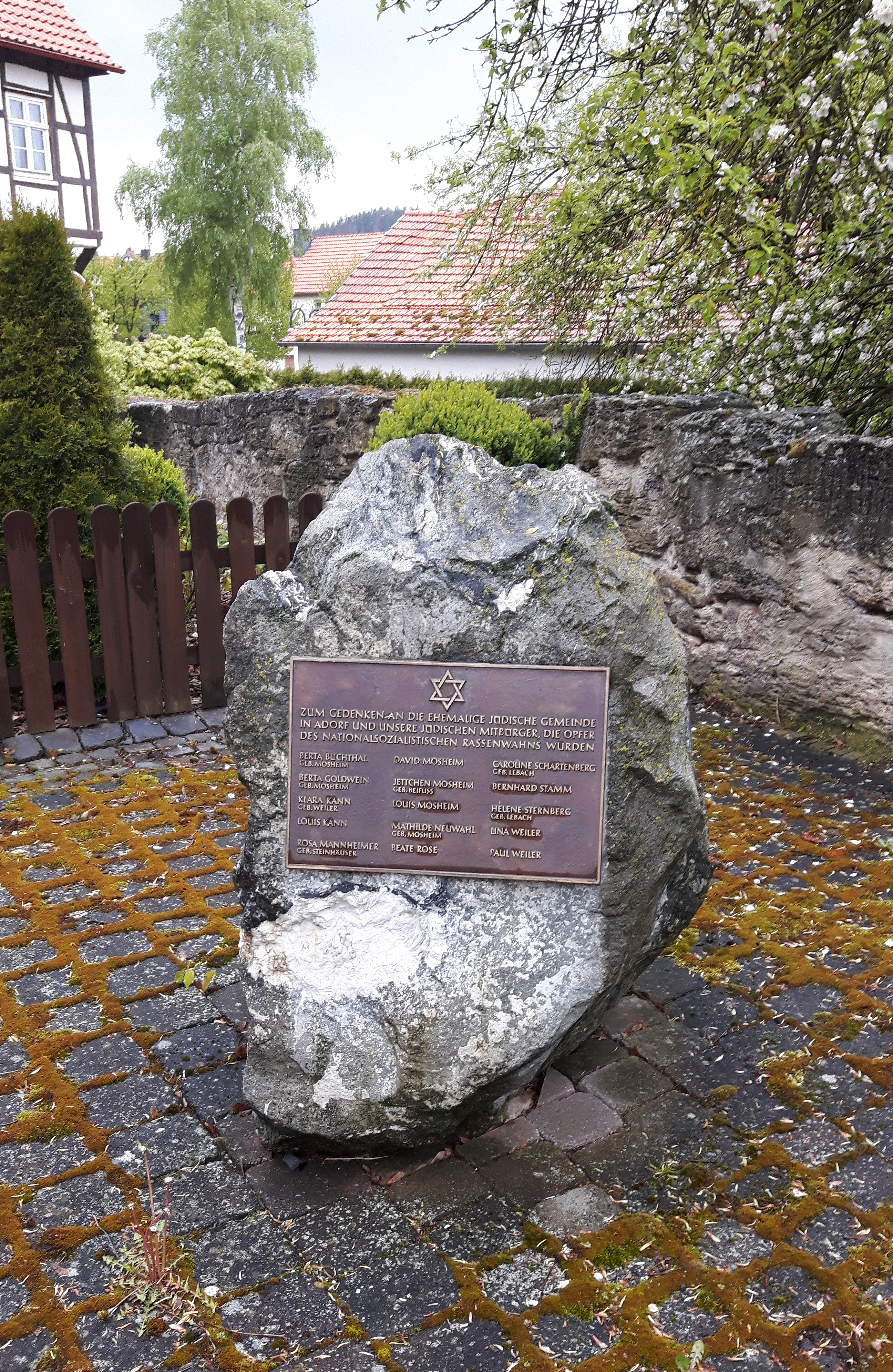 Gedenkstein für die jüdische Gemeinde und jüdischen Opfer des Nationalsozialismus in Adorf, Gemeinde Diemelsee